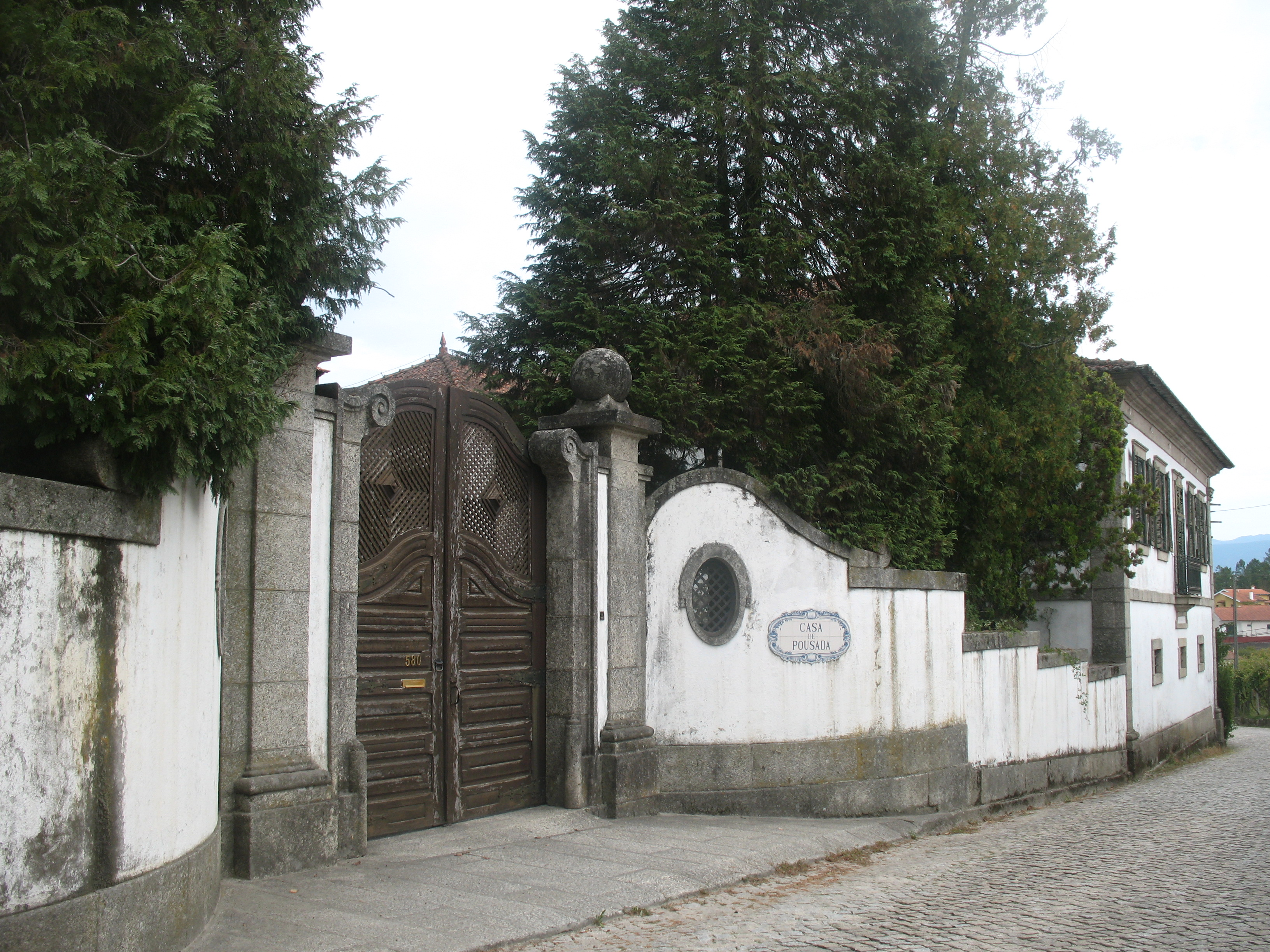 Amarante Fregim Casa de Pousada